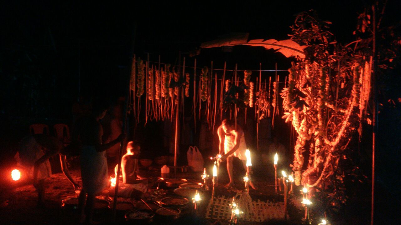 elangavathu kavu is a bhadrakali temple. situated near varappetty, moovatupuzha, Ernakulam dist, kerala india